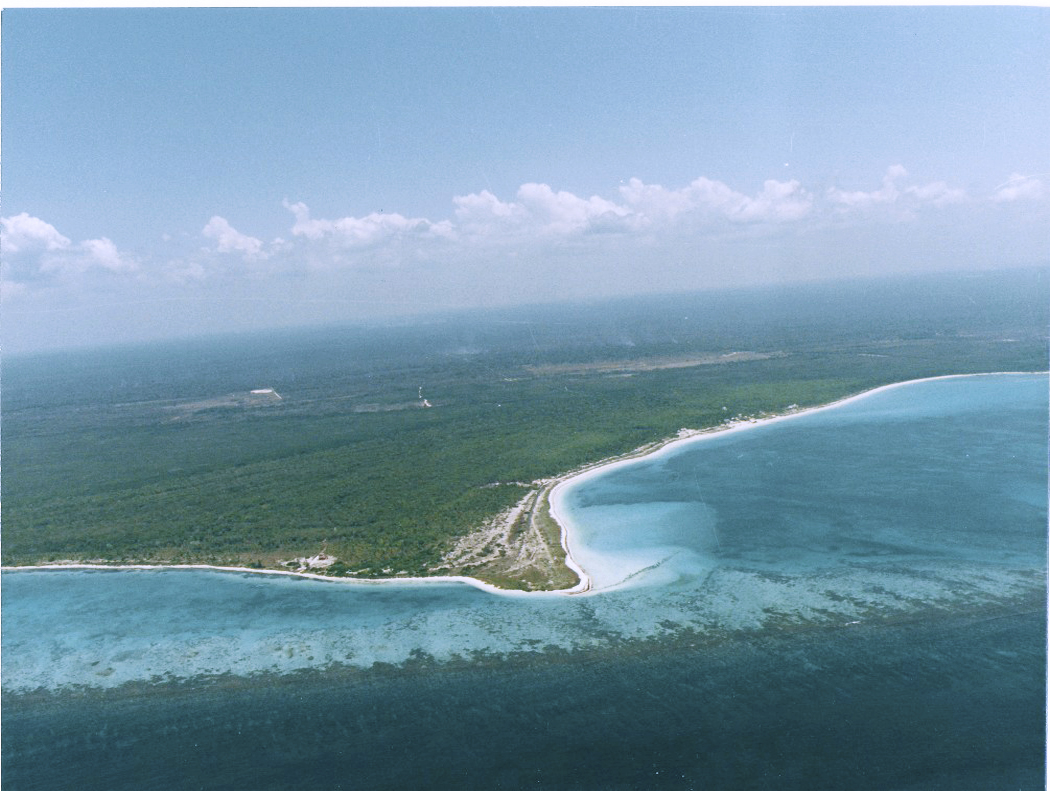 Punta Maroma, Mexico coastline